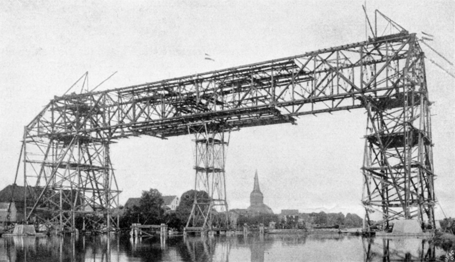 Schwebefähre über die Oste bei Osten